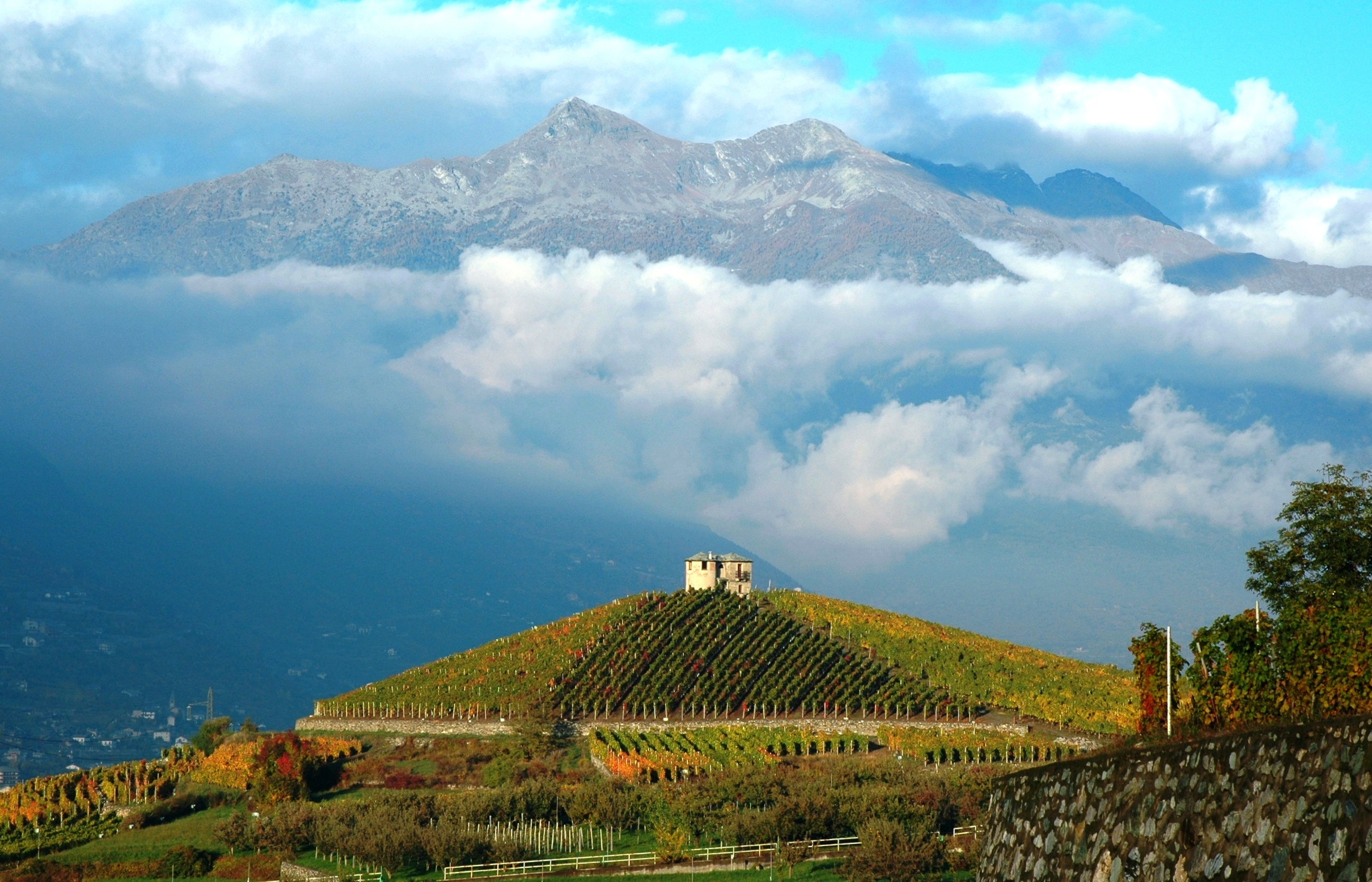 panorama di Les Crêtes di Charrère, in autunno. Viticoltura ad Aymavilles, Valle d'Aosta, Italia.